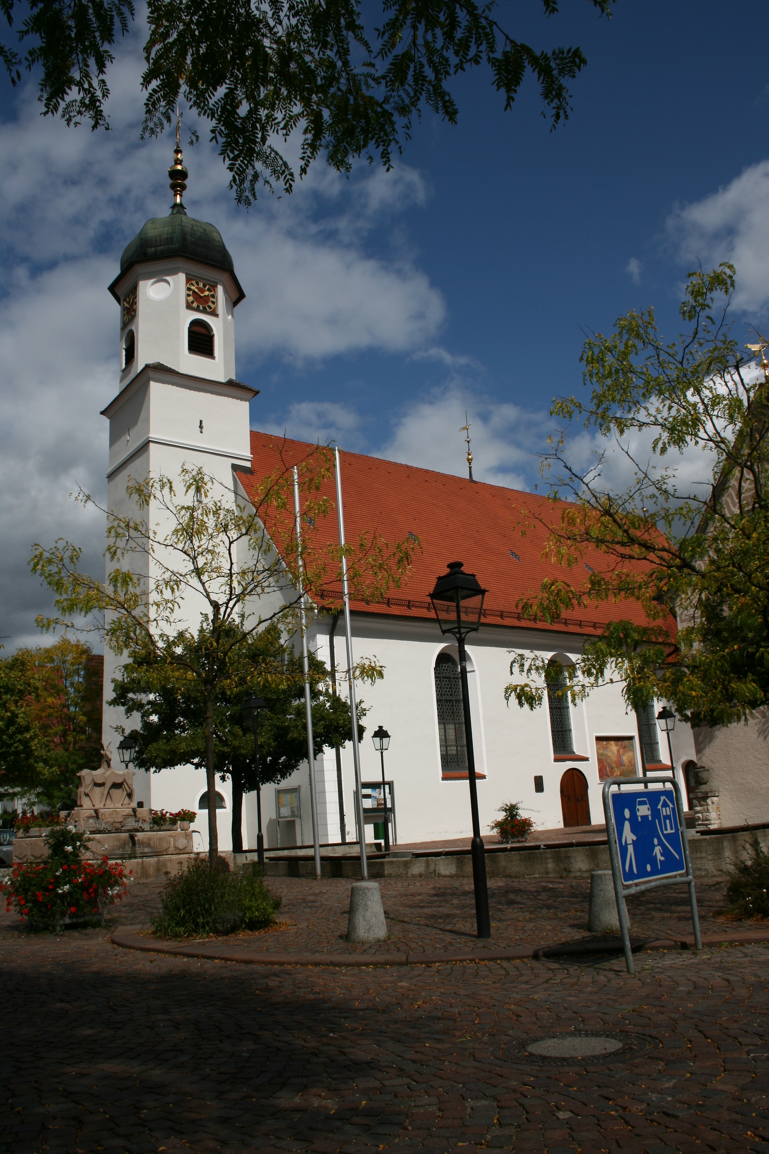 St. Vitus-Kirche in Hayingen auf der Schwäbischen Alb